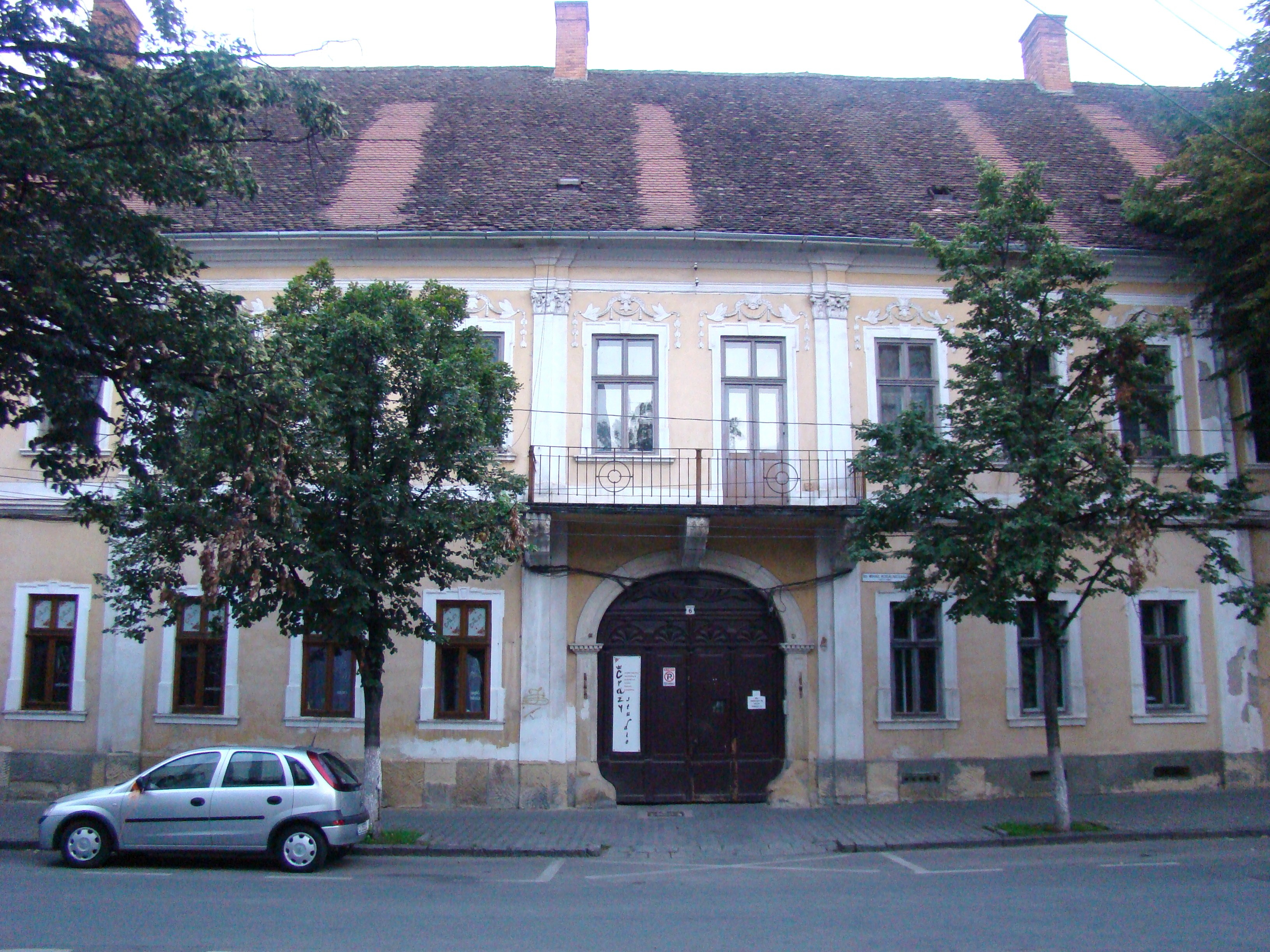 Clădire monument istoric, str.Mihail Kogălniceanu, nr.6